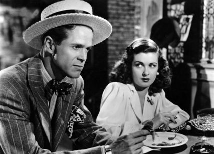 「スカーレット・ストリート」におけるダン・デュリエとジョーン・ベネット